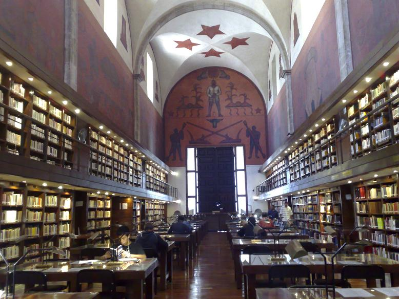 Interior de la Bibiloteca Iberoamericana